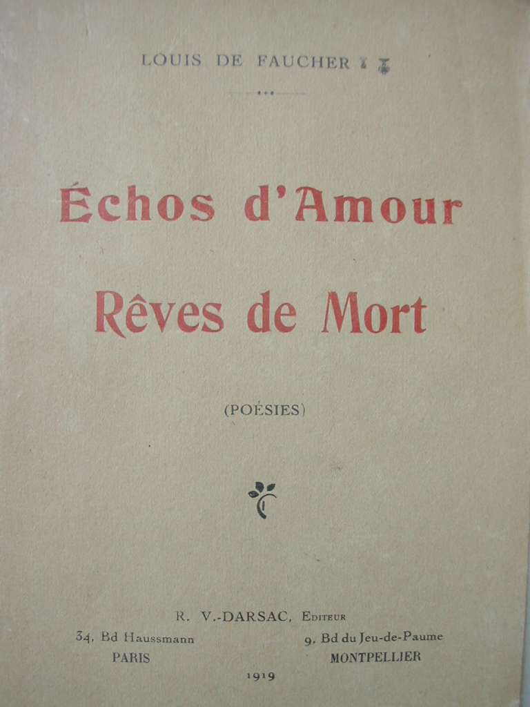 Couverture du Recueil de Poésies de Louis de Faucher